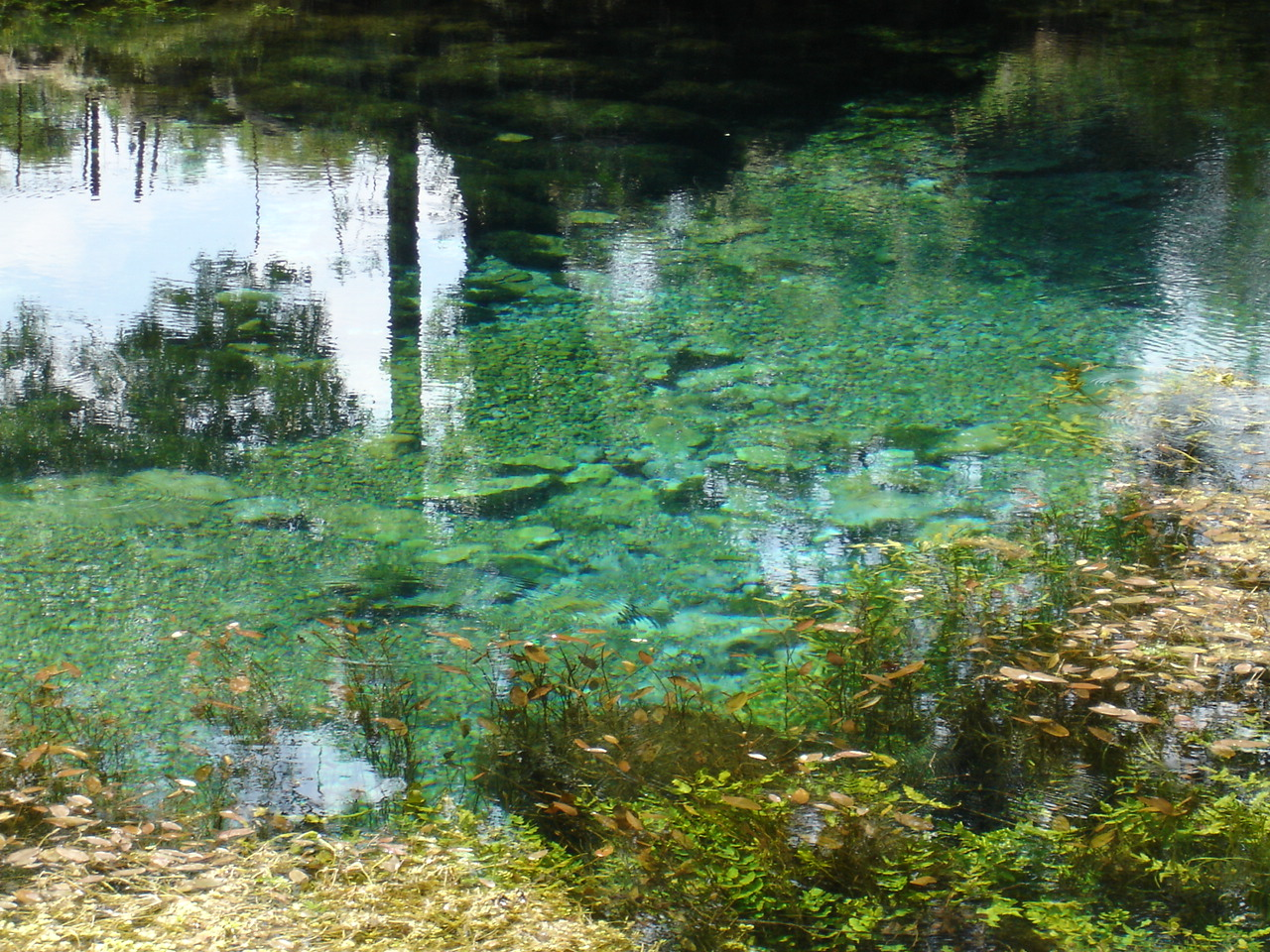 Sources de la Buèges - Hérault 34 - France